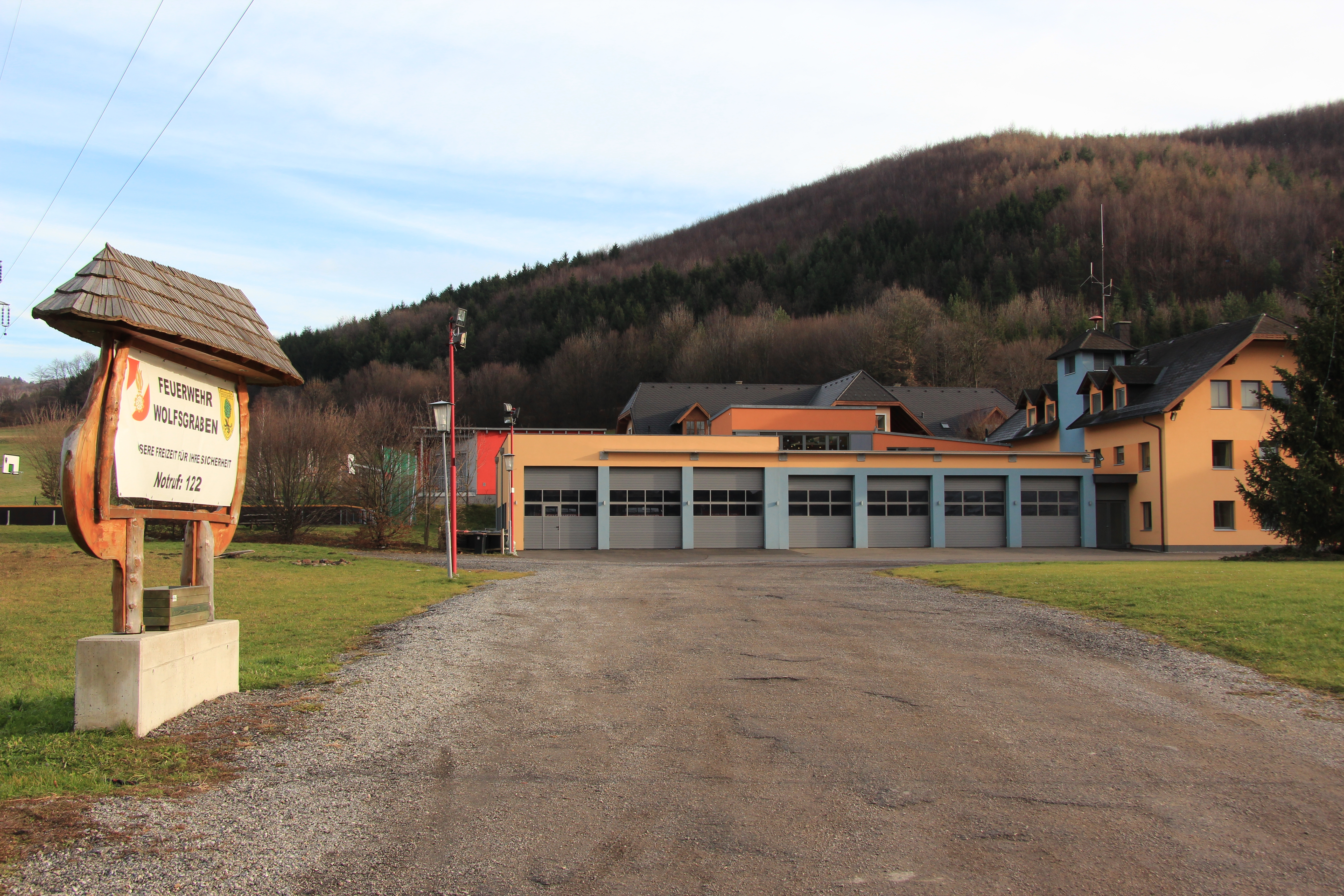 Feuerwehrhaus in Wolfsgraben